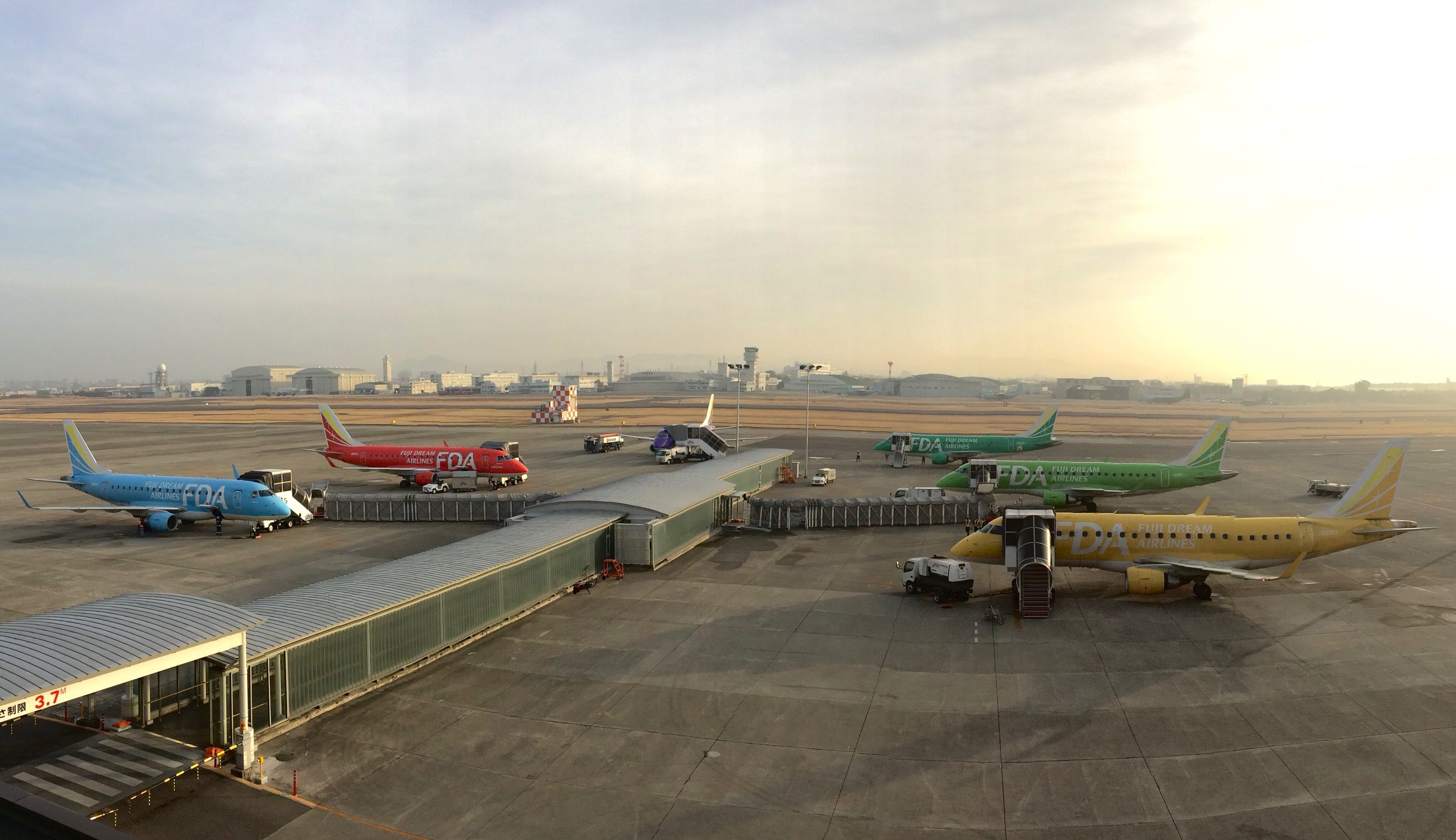 6 COLORS Fuji Dream Airlines Embraer 170、175 NKM